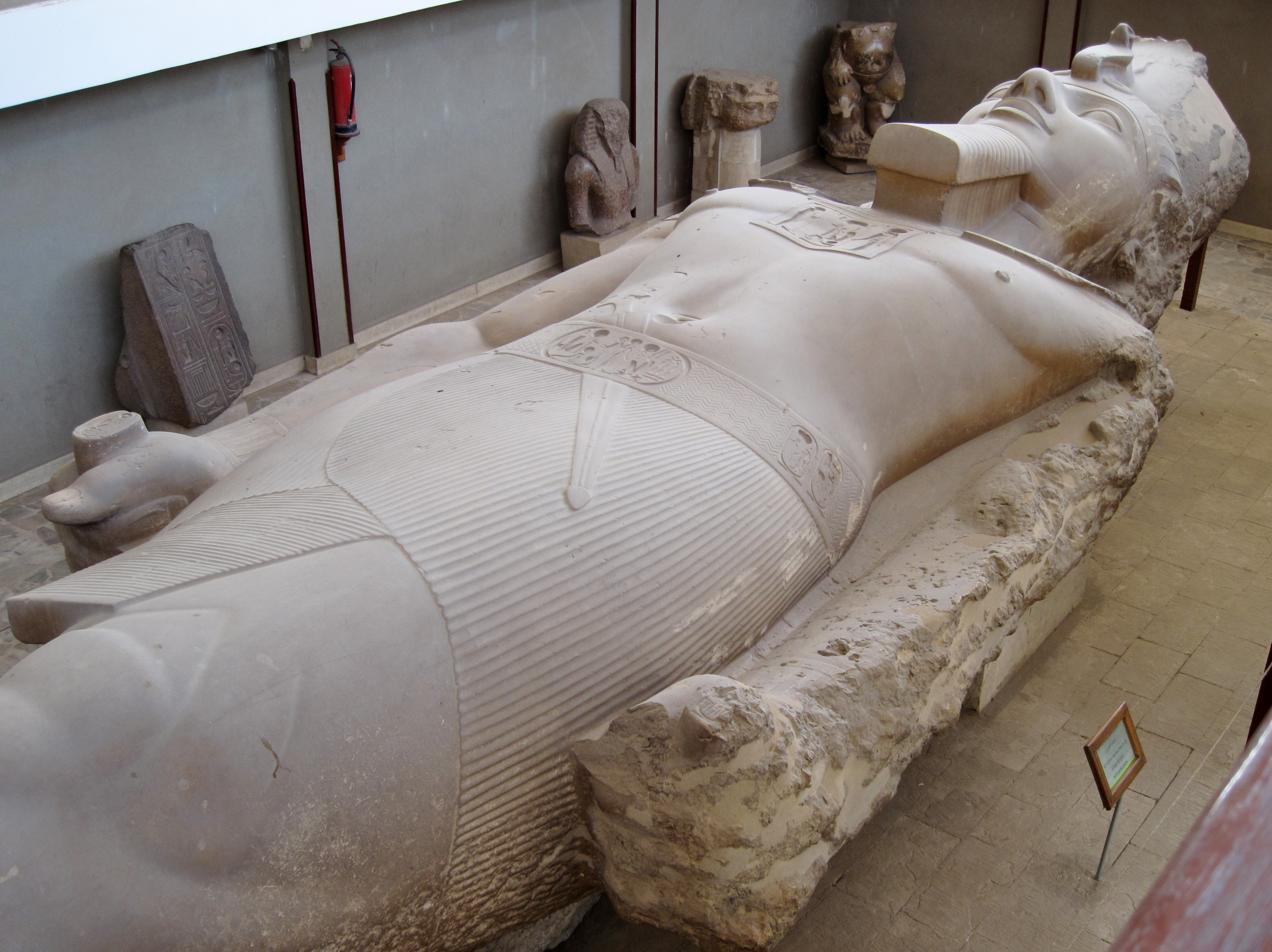 Liegende Kolossalstatue Ramses II. im Museumsgebäude von Memphis, Ägypten